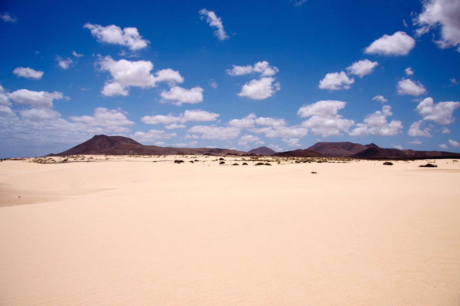 Dünen bei Corralejo (Parque Natural de las Dunas de Corralejo), Fuerteventura, Kanarische Inseln, Spanien